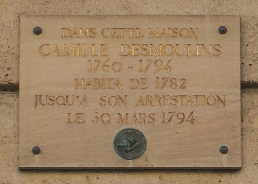 Plaque en hommage à Camille Desmoulins 22 rue de l'Odéon (Paris, 6e).